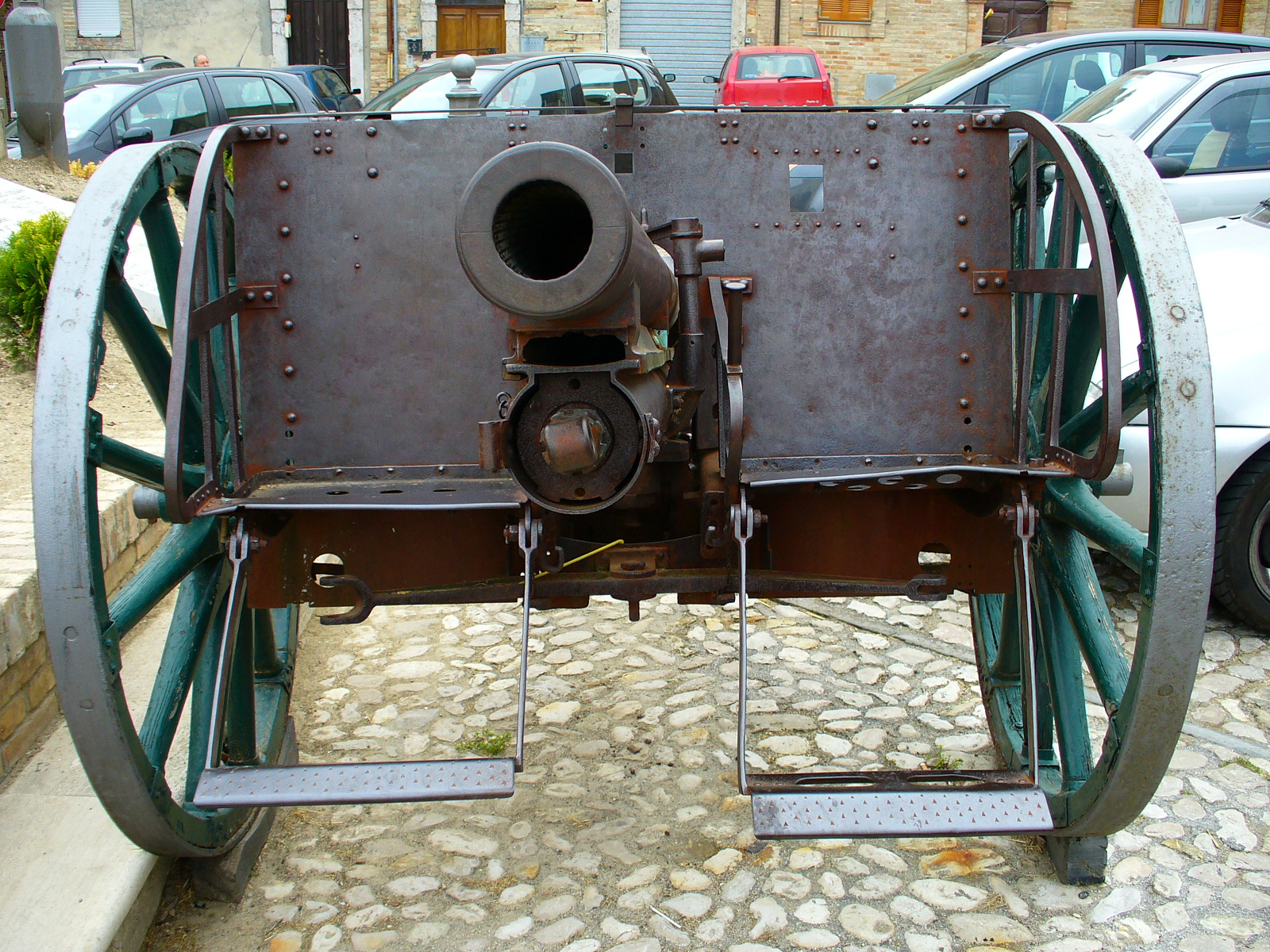 Austro-Hungarian 8 cm FK M. 5/8 cannon Gun data